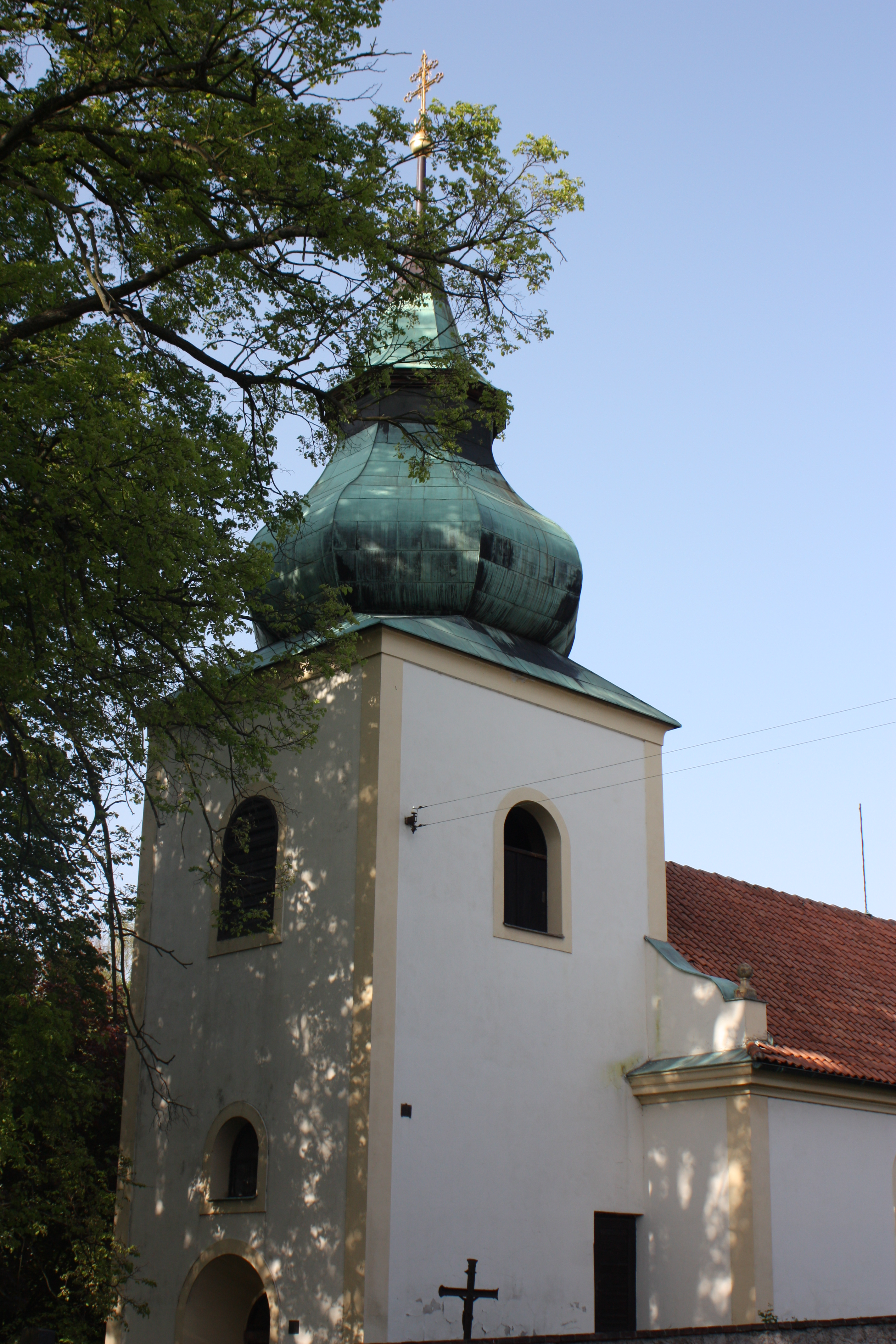 kostelní věž